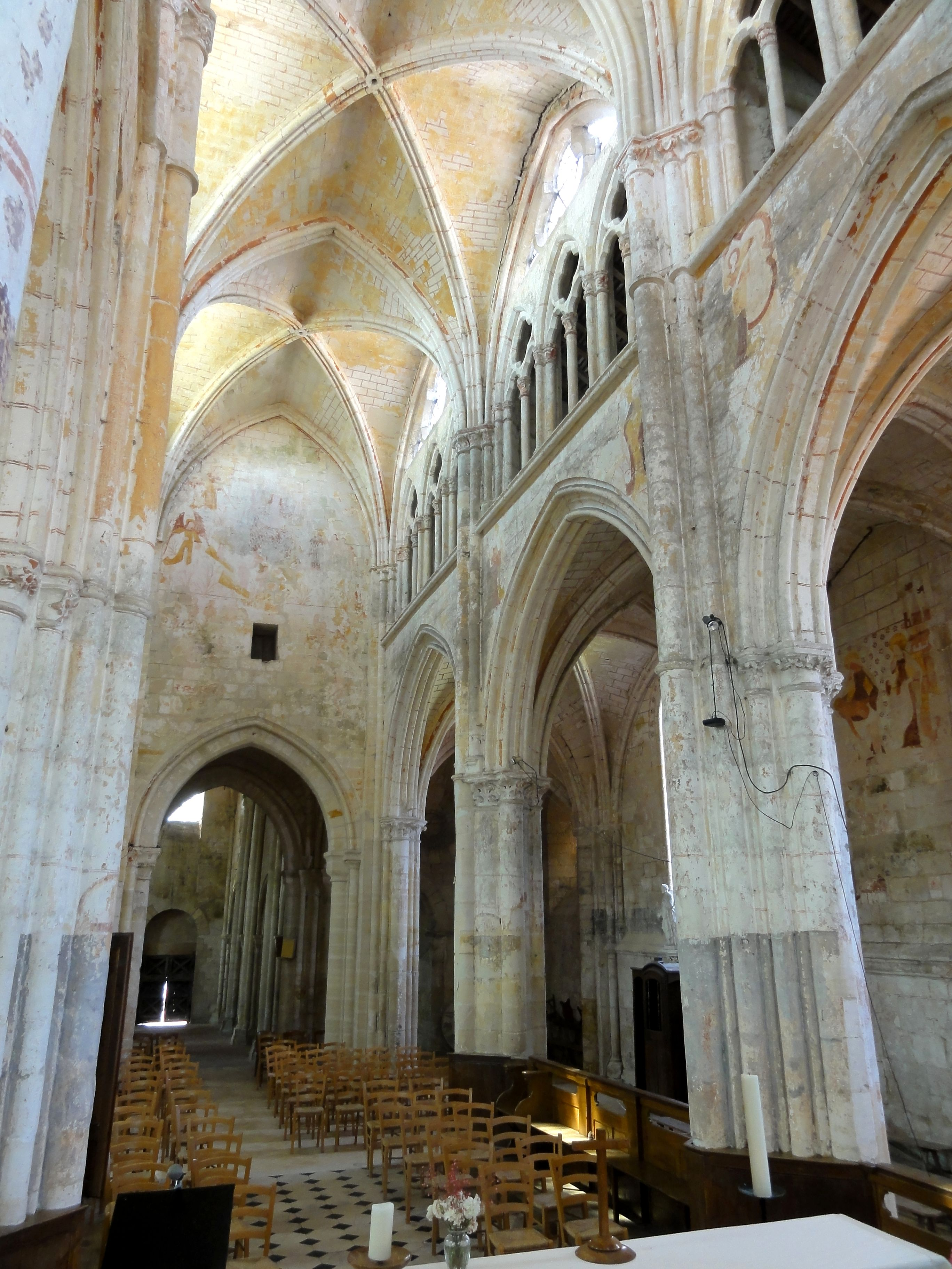 Chœur, vue vers l'ouest.